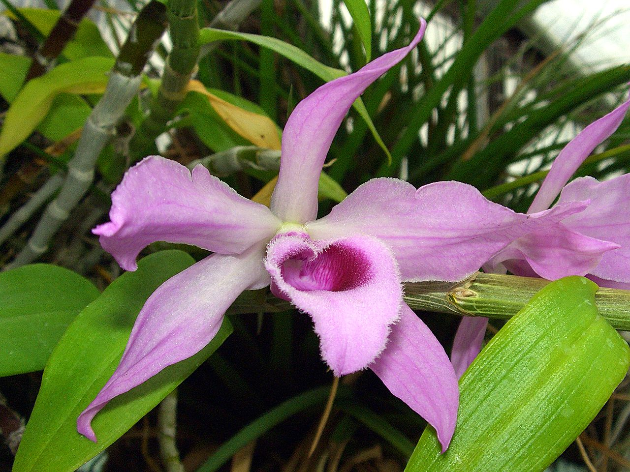 Dendrobium anosmum - flower